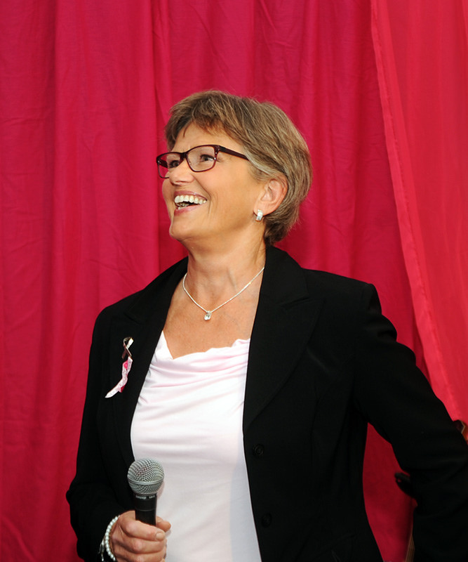 Katarina Hultling